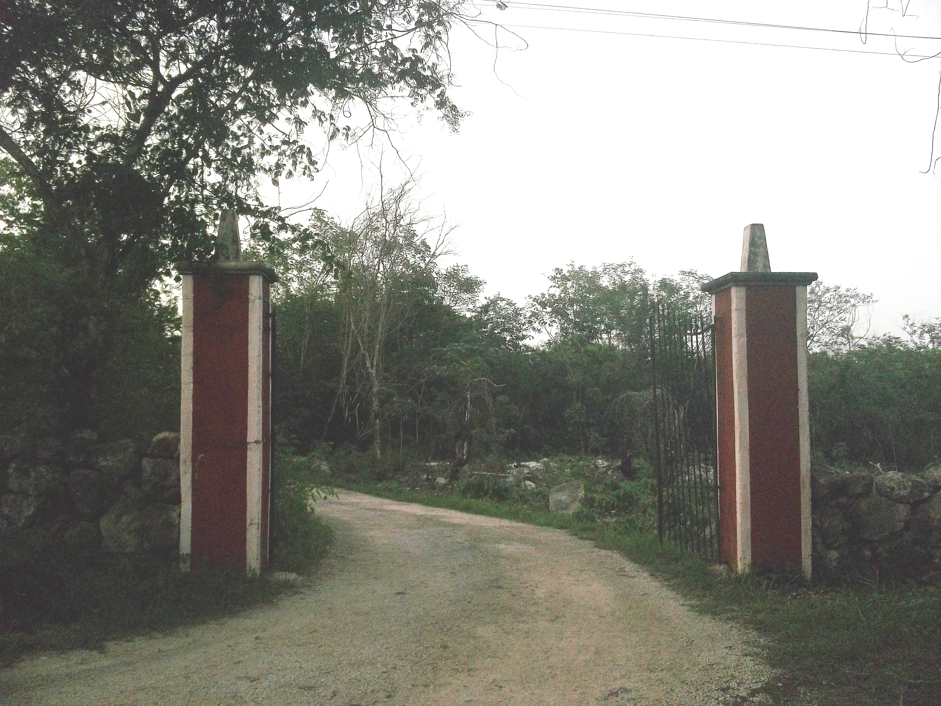 Entrada a la hacienda Ticum.